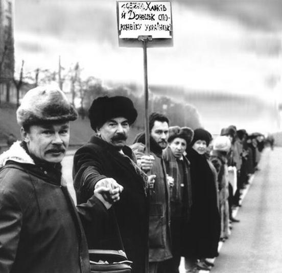 Живий_ланцюг: Фото